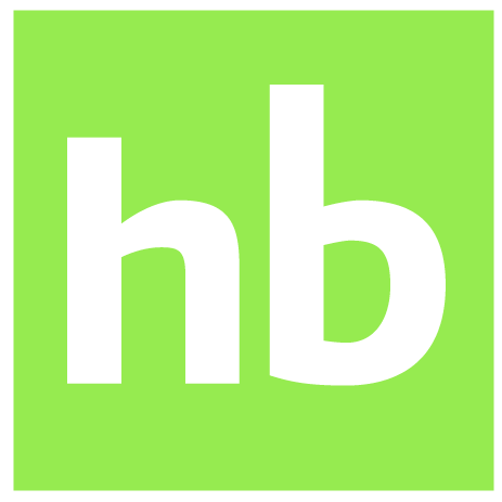 GBMhomebroker plataforma digital que permite a los usuarios la compraventa de acciones y valores que se encuentran listados en la Bolsa Mexicana de Valores